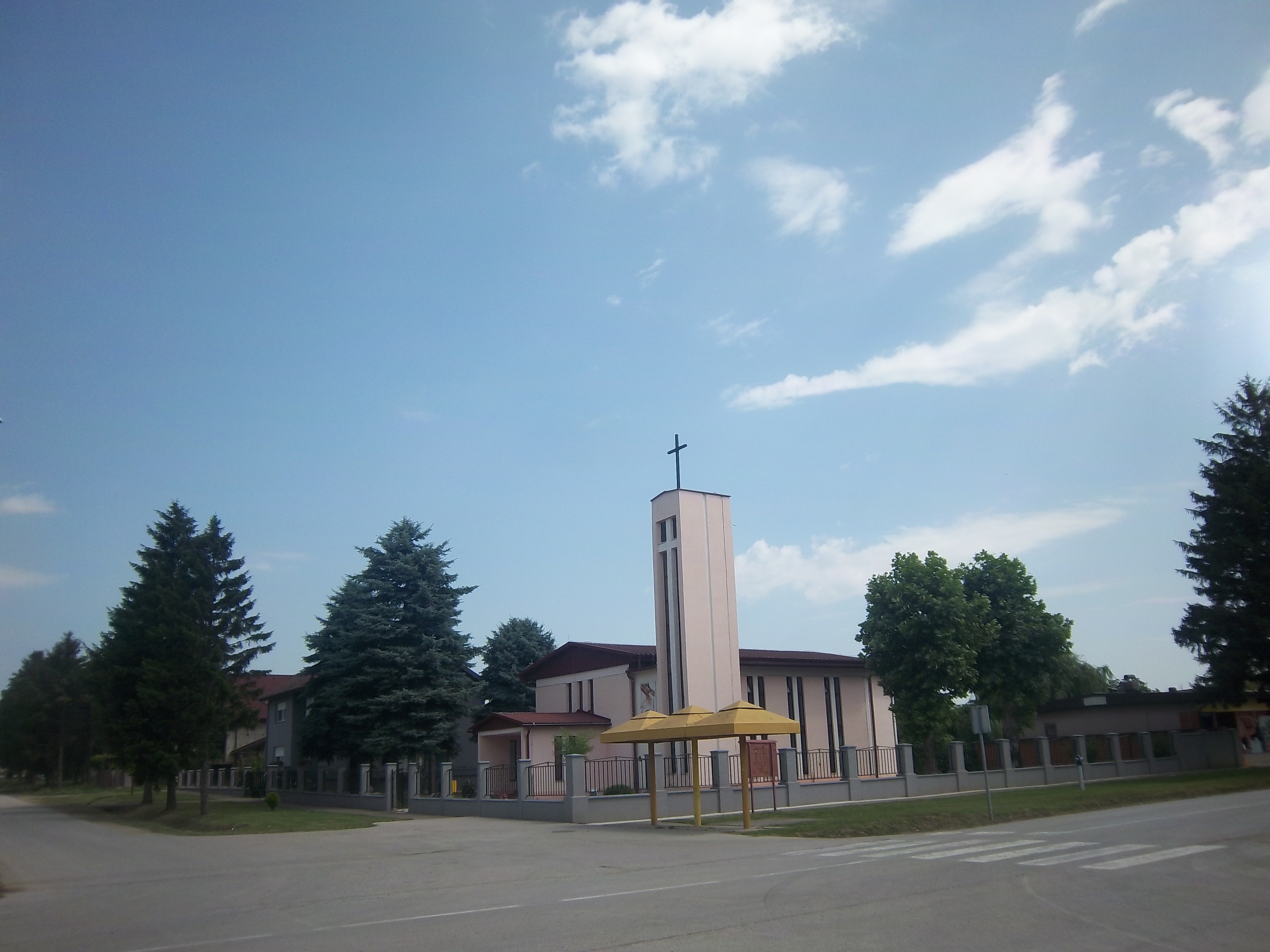 Srpskohrvatski / српскохрватски: Naselje Berak u Općini Tompojevci u Vukovarsko-srijemskoj županiji (Republika Hrvatska).